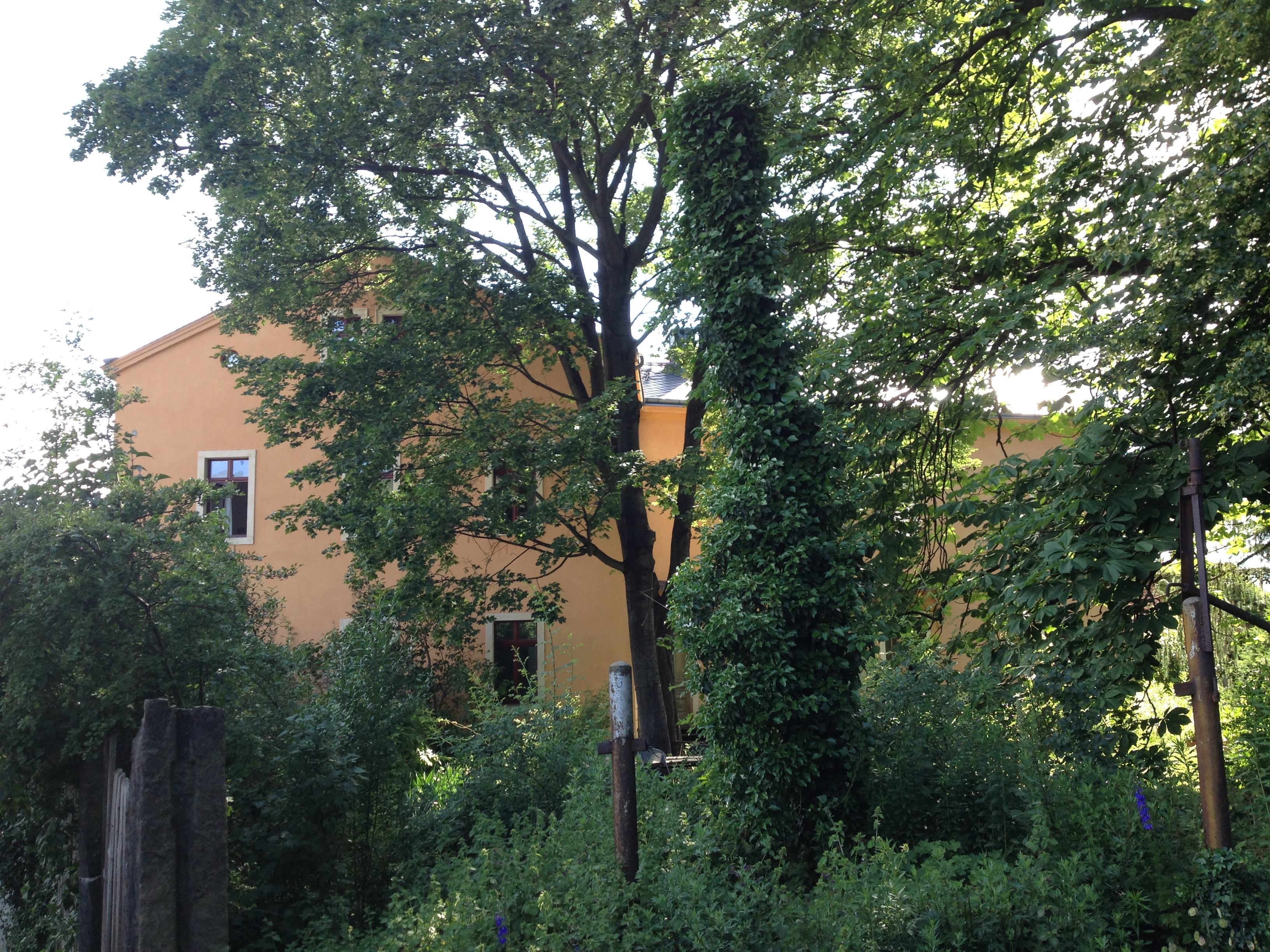 Radebeul, Villa Dankbarkeit Rückseite